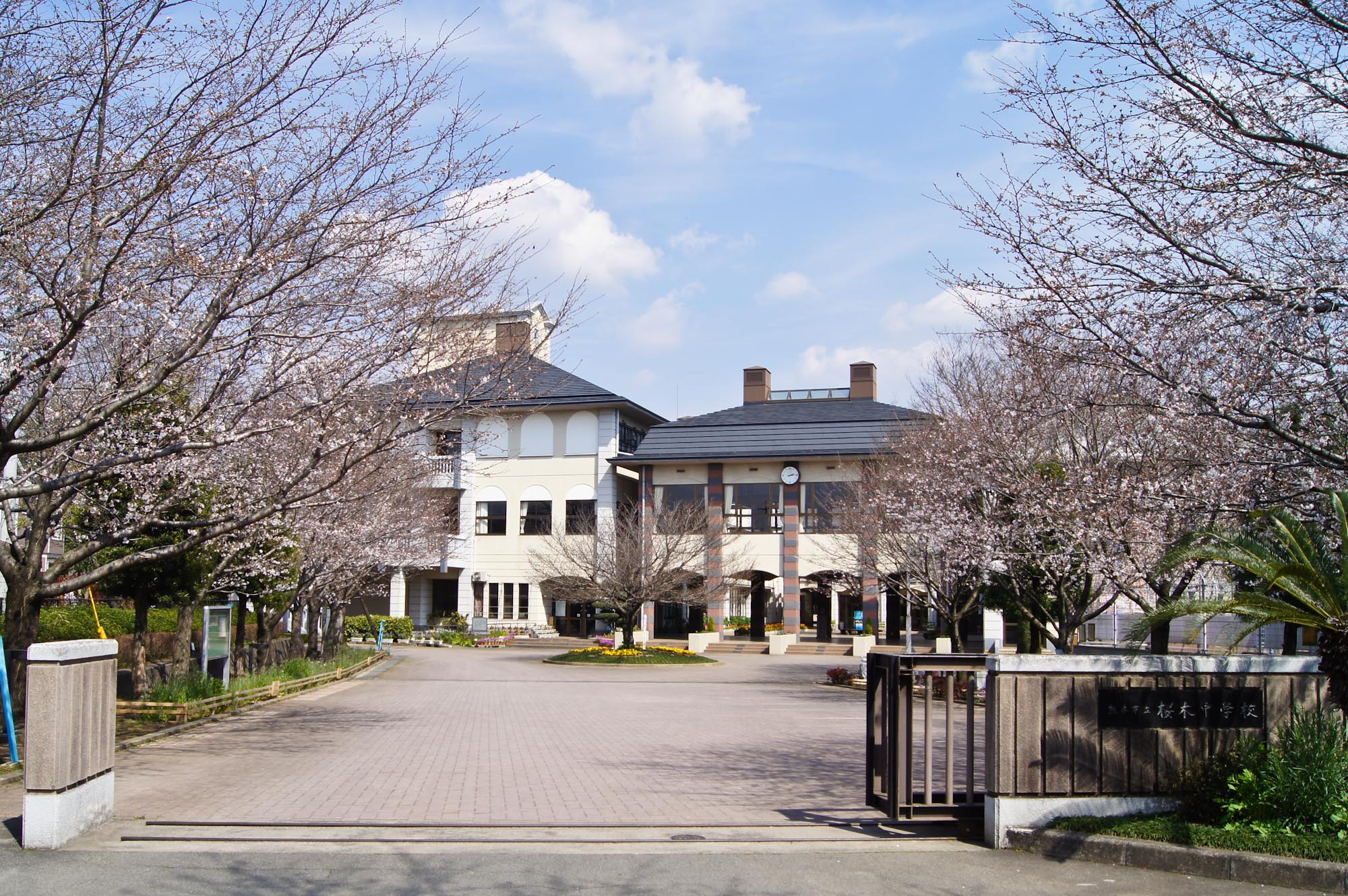 熊本市立桜木中学校